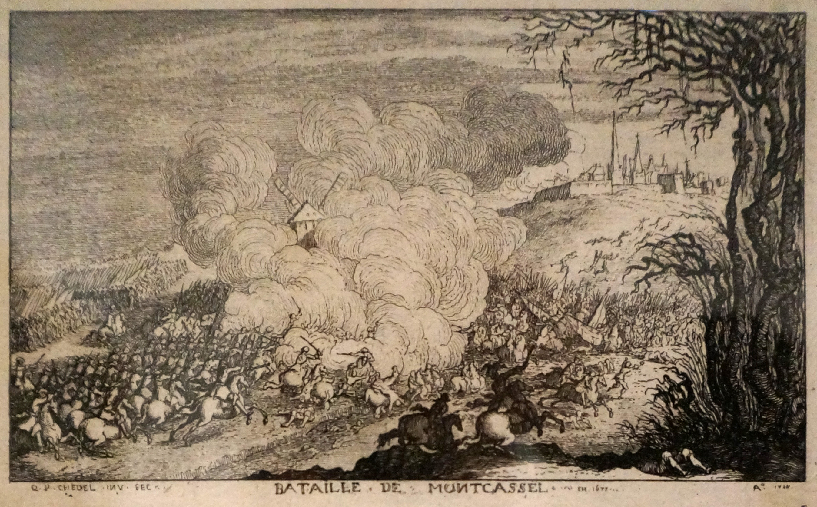 Troisième bataille de Montcassel ou Bataille de Peene en 1677.